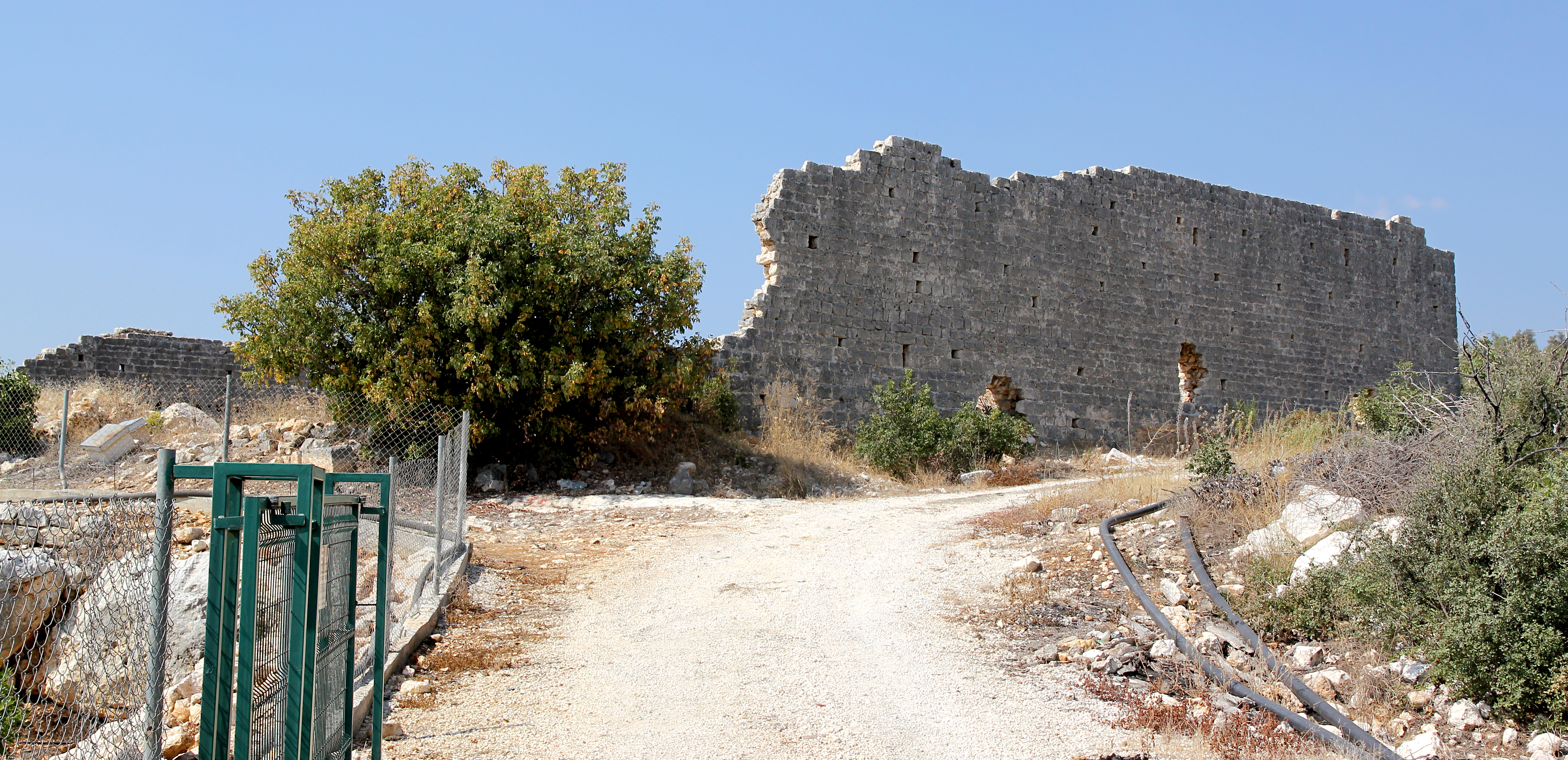 Çet Tepe, in der Umgebung von Erdemli, Südtürkei, römisch-byzantinischer Wirtschaftshof, Ansicht von Osten